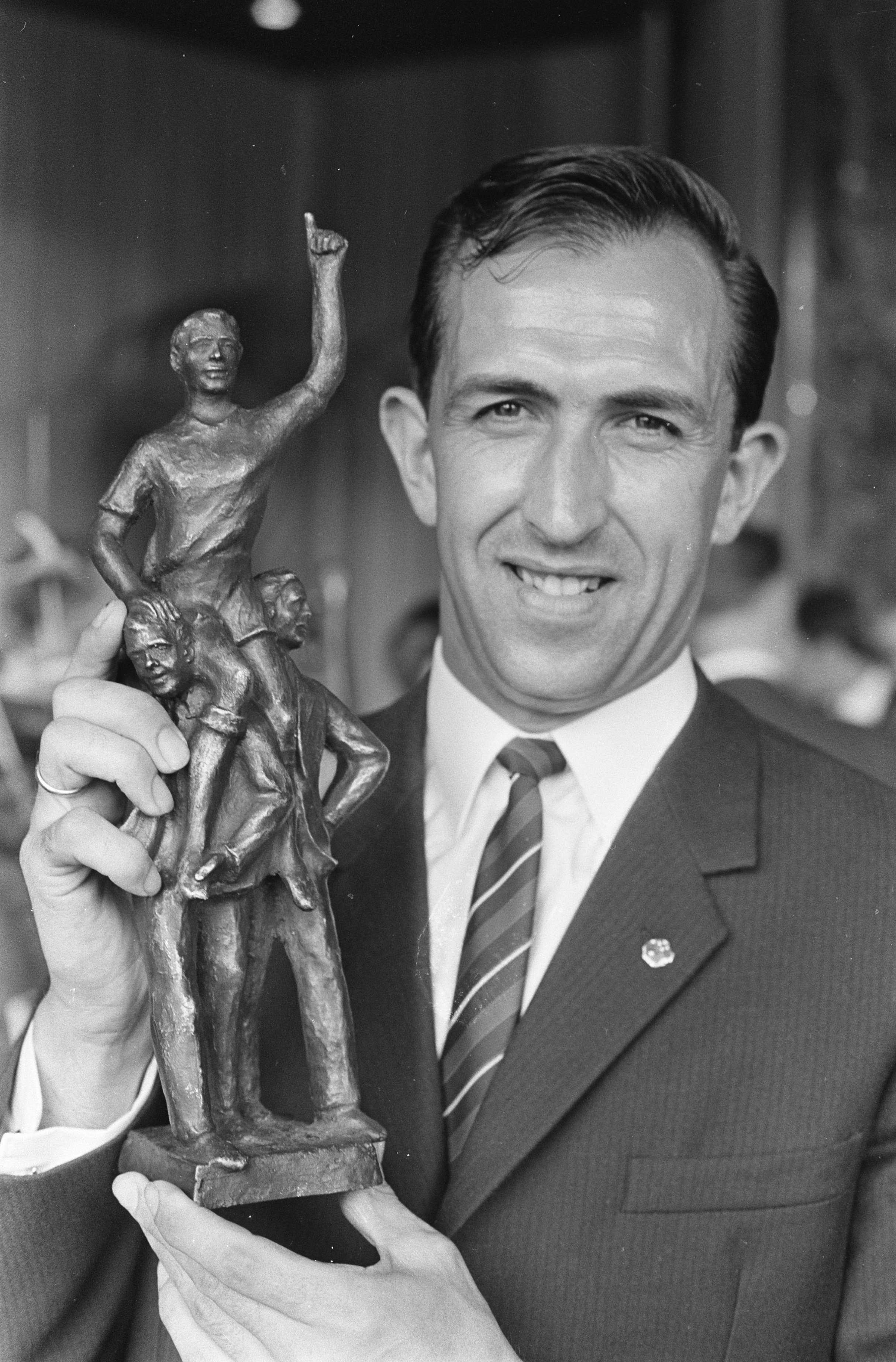 Collectie / Archief : Fotocollectie Anefo Reportage / Serie : [ onbekend ] Beschrijving : Eddy Pieters Graafland voetballer van het jaar, Eddy met beeldje Datum : 2 juni 1967 Trefwoorden : prijzen, sport, voetballers Persoonsnaam : Eddy Pieters Graafland Fotograaf : Kroon, Ron / Anefo Auteursrechthebbende : Nationaal Archief Materiaalsoort : Negatief (zwart/wit) Nummer archiefinventaris : bekijk toegang 2.24.01.05 Bestanddeelnummer : 920-3747